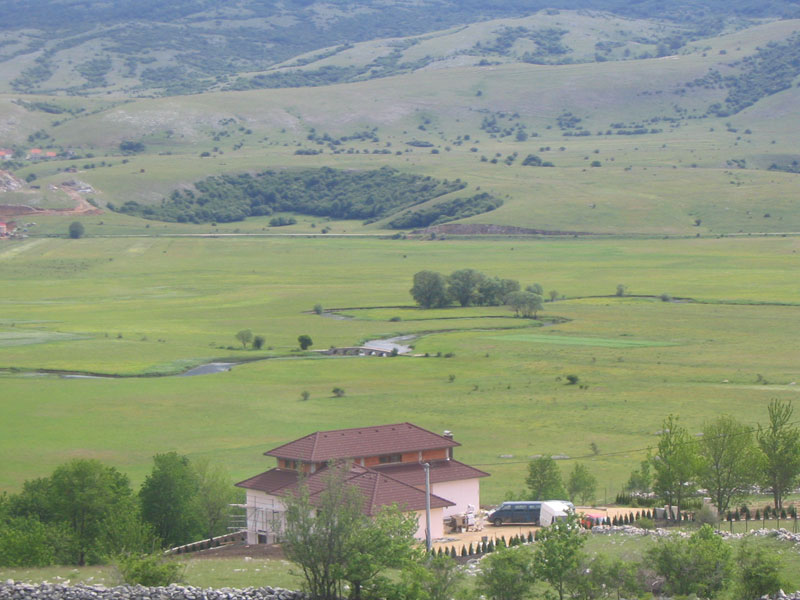 Šuica river, Šuica; Duvanjsko Polje. Bosnia.